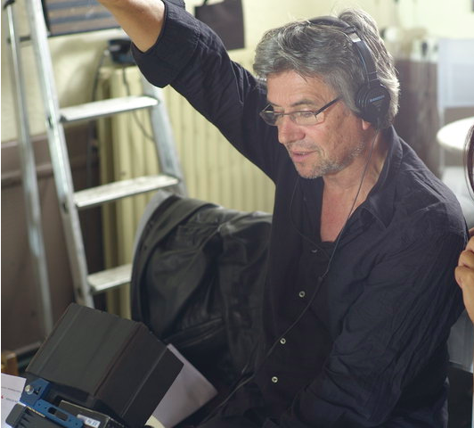 Bernard Malaterre sur le tournage de la Nouvelle Maud